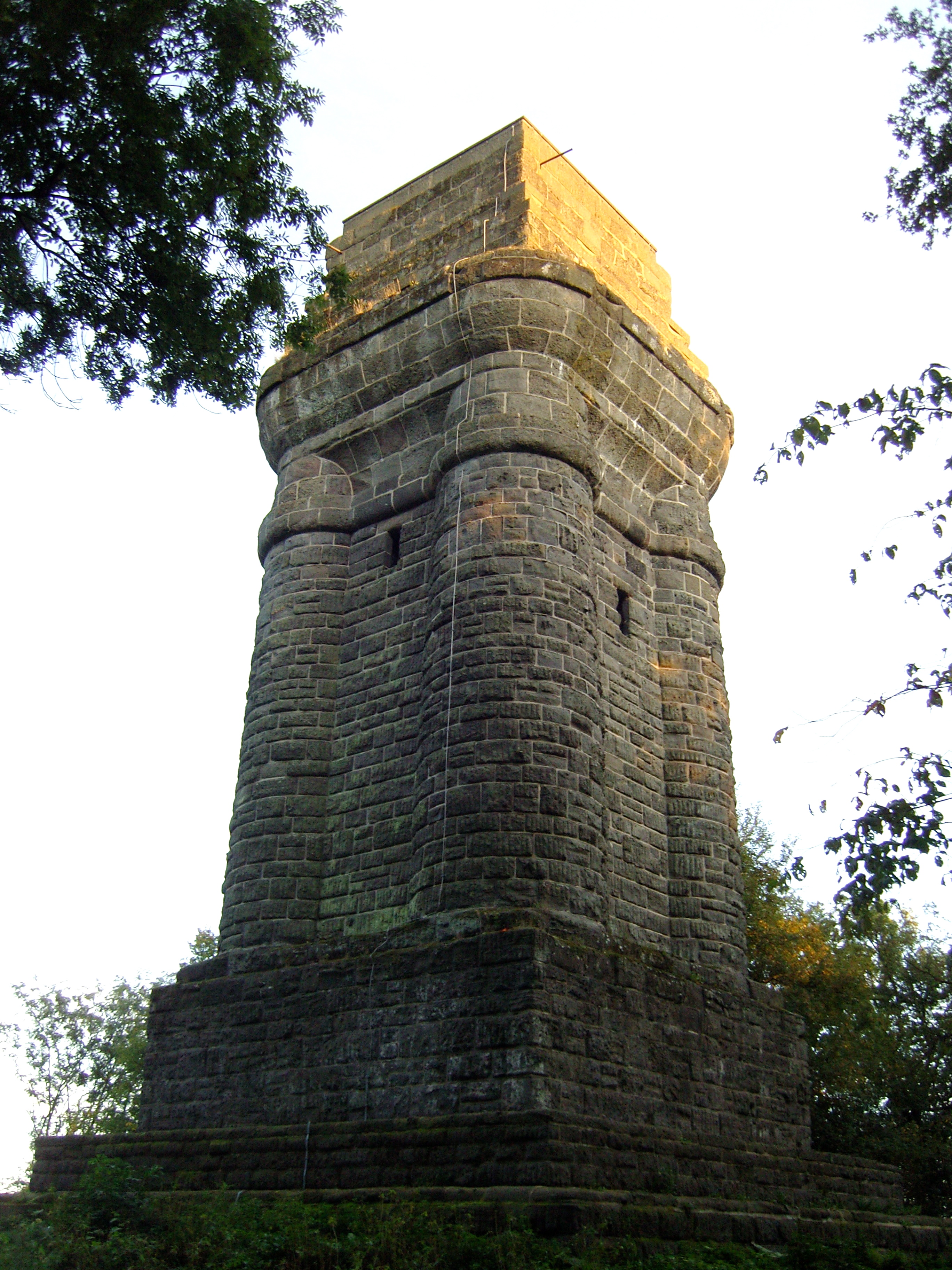 Der Bismarkturm auf dem Brasselsbeg in Kassel